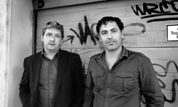 Garage X Geschäftsleitung Abdullah & Posch